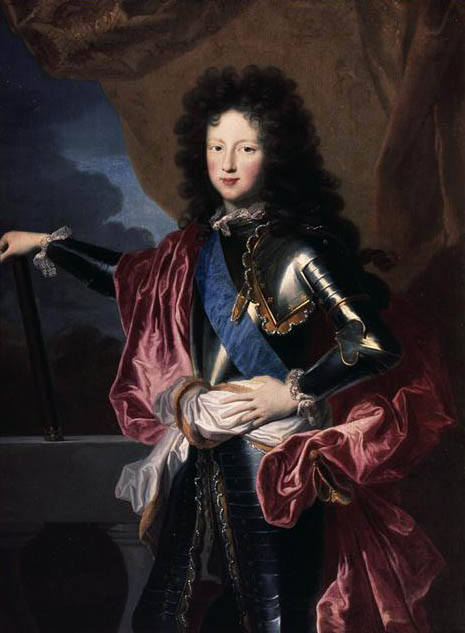 Copie d'après d'un tableau peint en 1689 par Rigaud conservé au musée de Perpignan